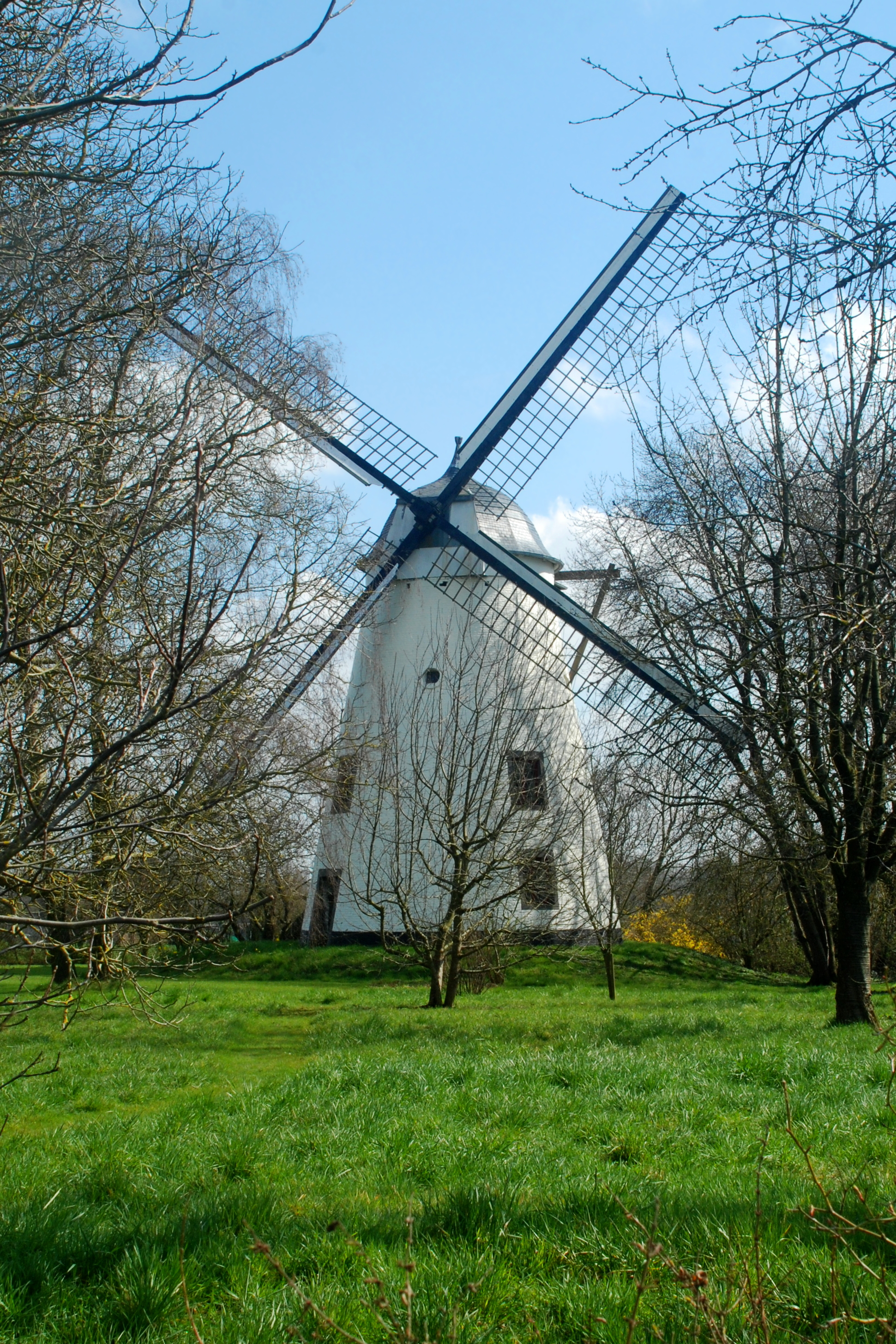 Belgique - Walhain - Moulin du Tiège